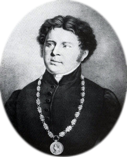 Jakob Friedrich Binder (1787-1856), 1821-1853 Erster Bürgermeister von Nürnberg, Lithographie von A. Weber nach einem Gemälde von F. Hahn